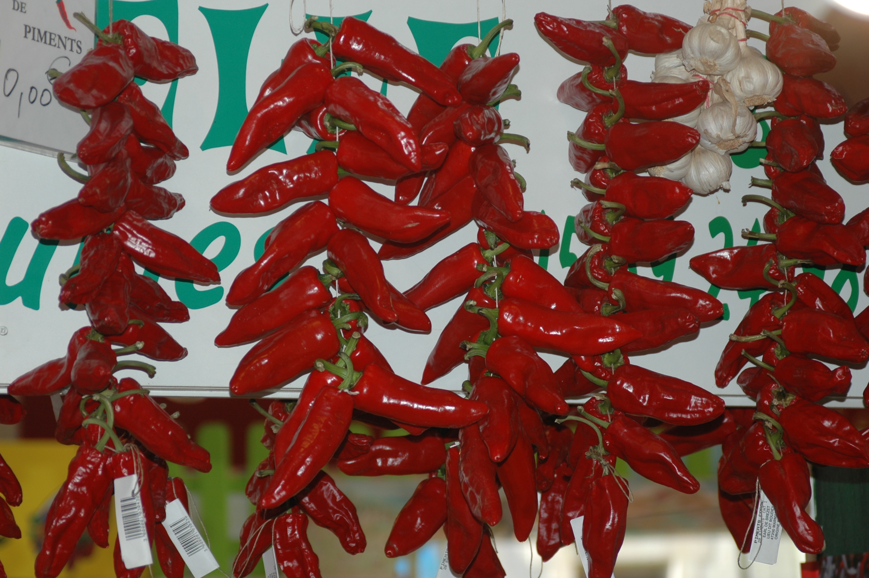 Piments d'Espelette, au marché de Biarritz. Photo prise le 06/08/06 par Harrieta171